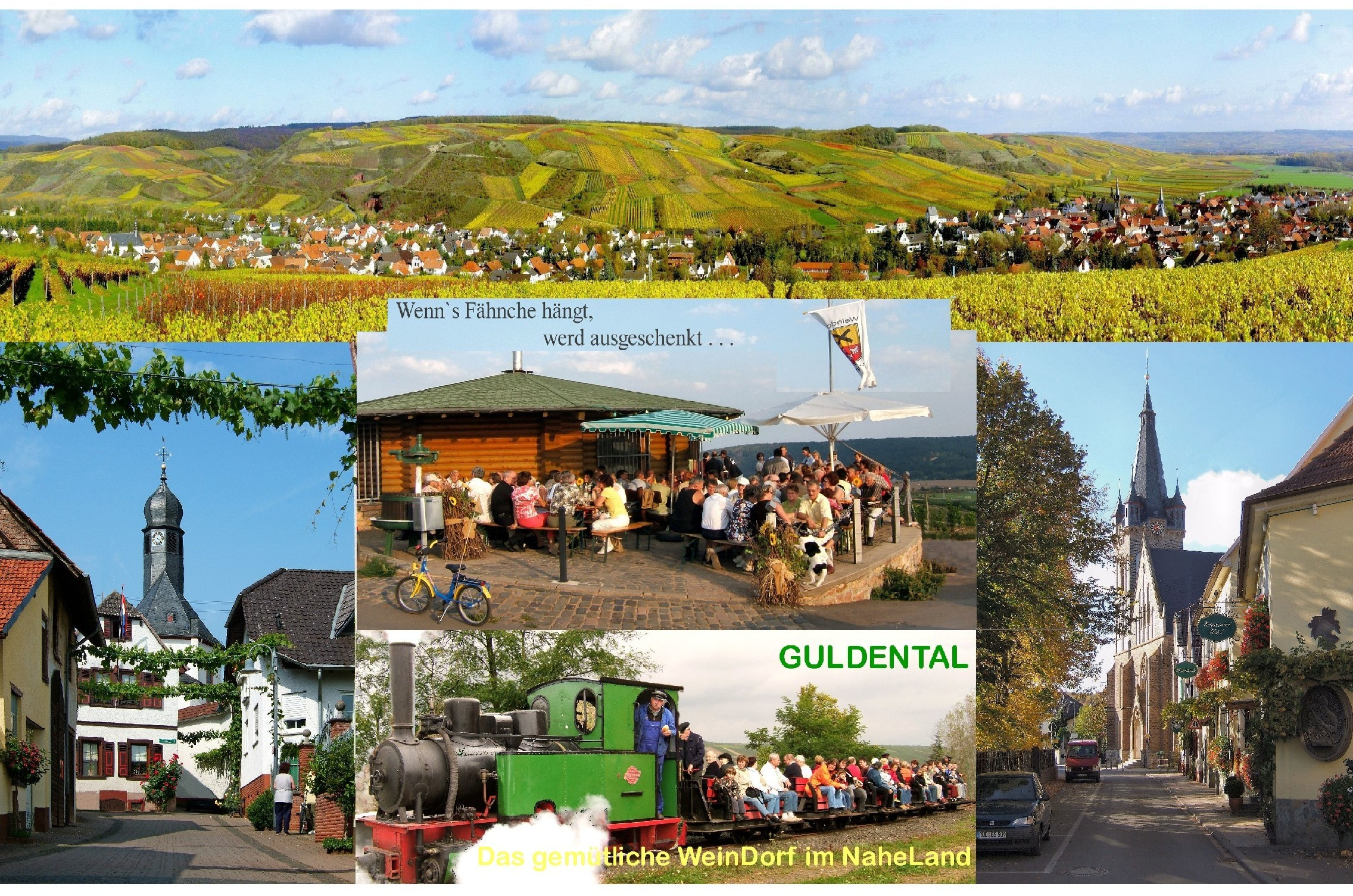 Guldental - Das gemütliche Weindorf im Naheland